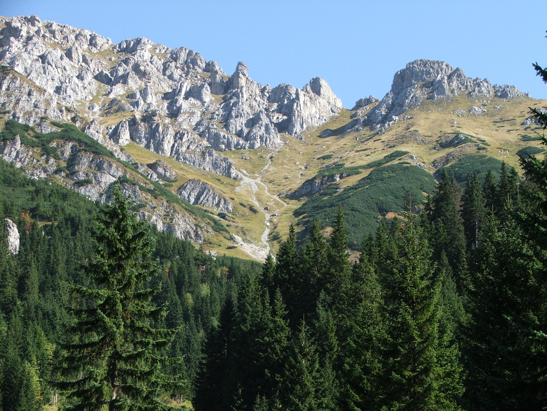 Rzędy Tomanowe (Tatra Mountains, Ciemniak)